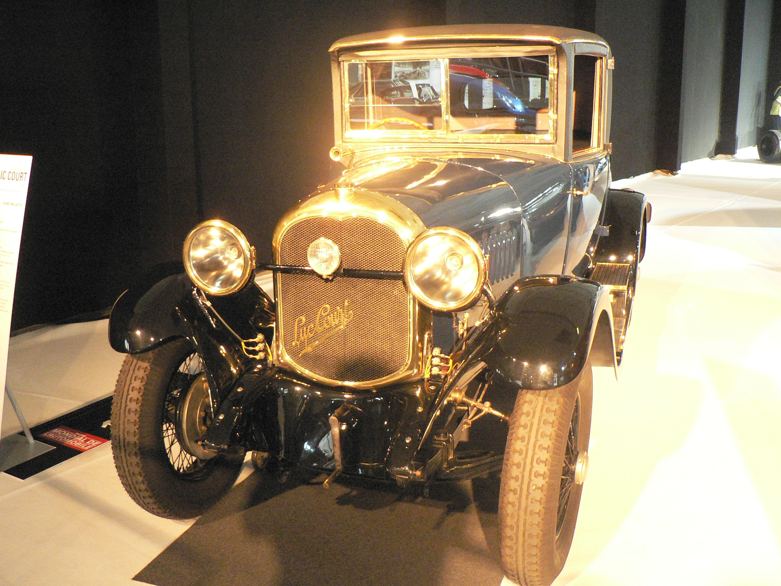 Mondial de l automobile de Paris (October 2006)